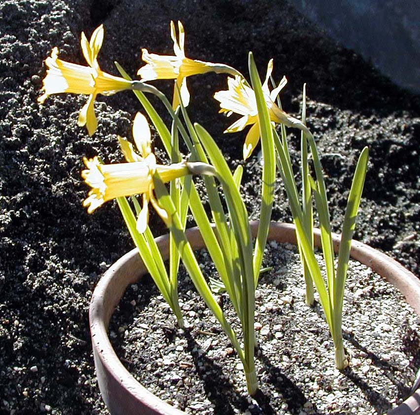 Narcissus eugeniae (Please, don't recategorize). Real Jardín Botánico, Madrid.